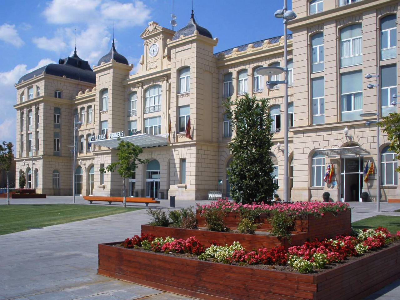 Estación Lleida-Pirineus, en Lérida